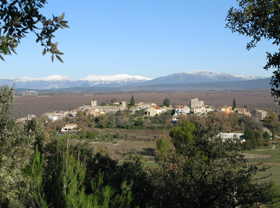 Côté ouest du village de Montmeyan, Var, France.